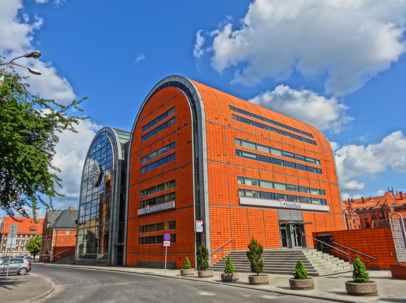 Zespół budynków BRE Banku w Bydgoszczy przy ulicy Grodzkiej, zwanych "szklanymi spichrzami", zbud. w 1998 r.